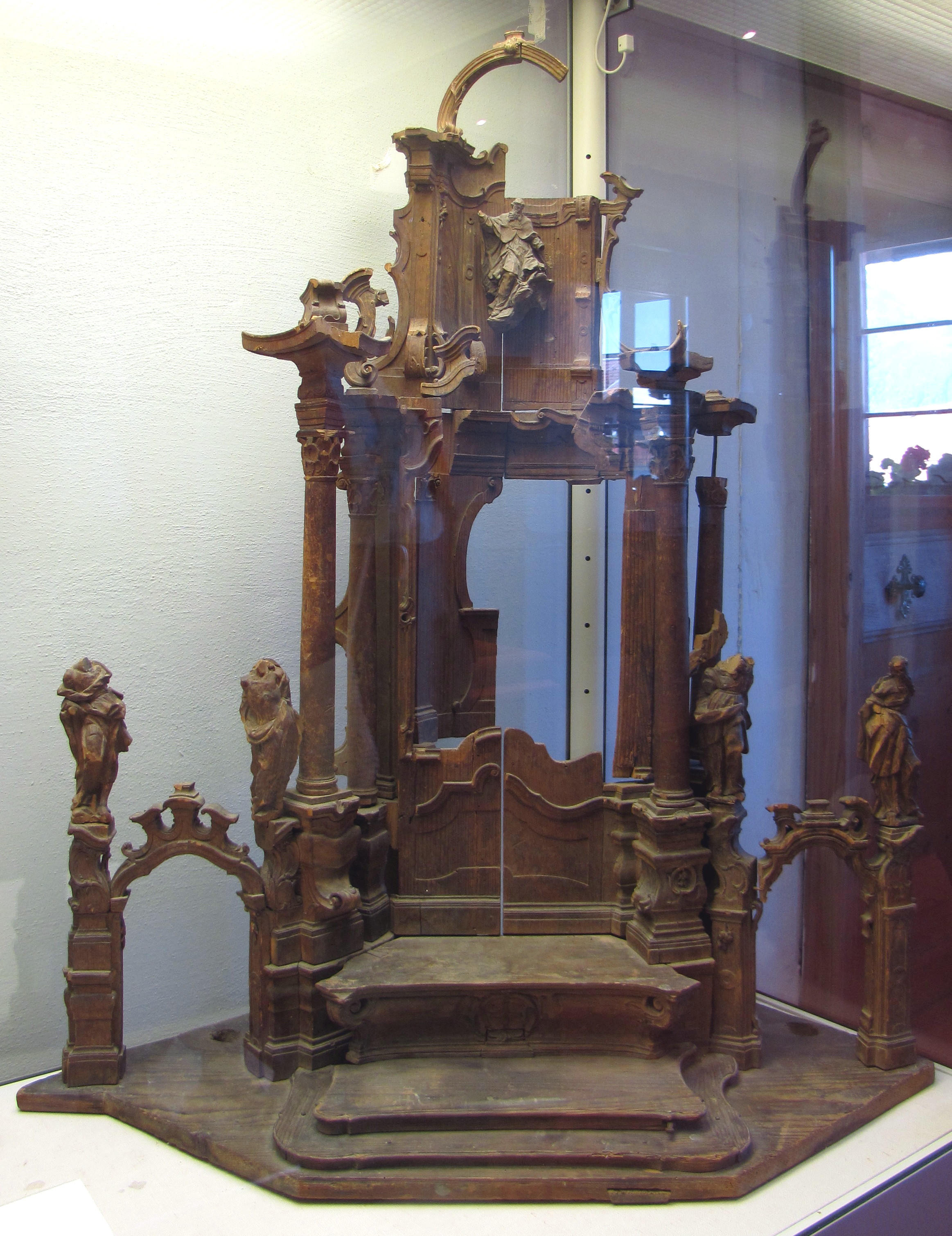 Altarmodell von Joseph Stapf in der Heimatkundlichen Sammlung im Heimathaus Pfronten